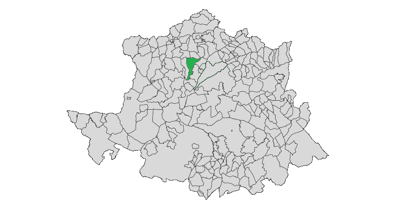 Localización del término municipal de Montehermoso en la Provincia de Cáceres. El mapa es el mismo que el de Plasencia, pero retocado.